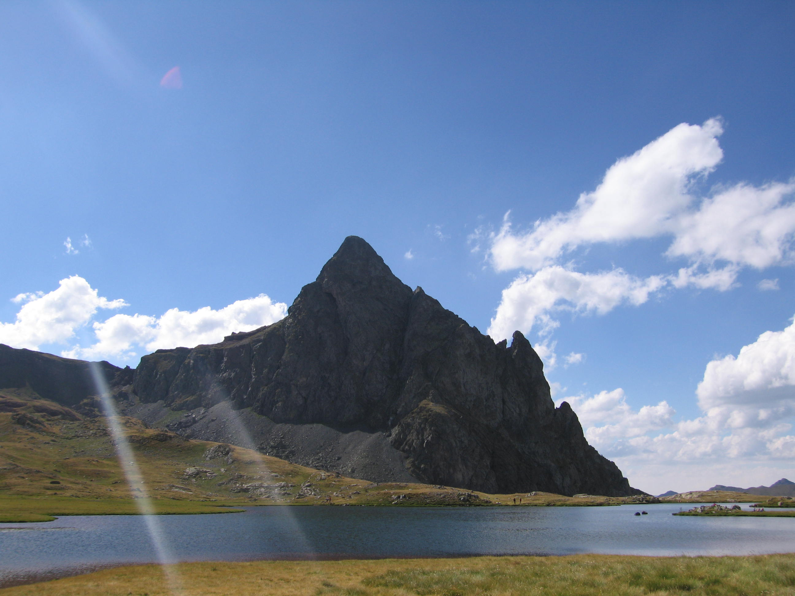 Aragonés: Ibons d'Anayet